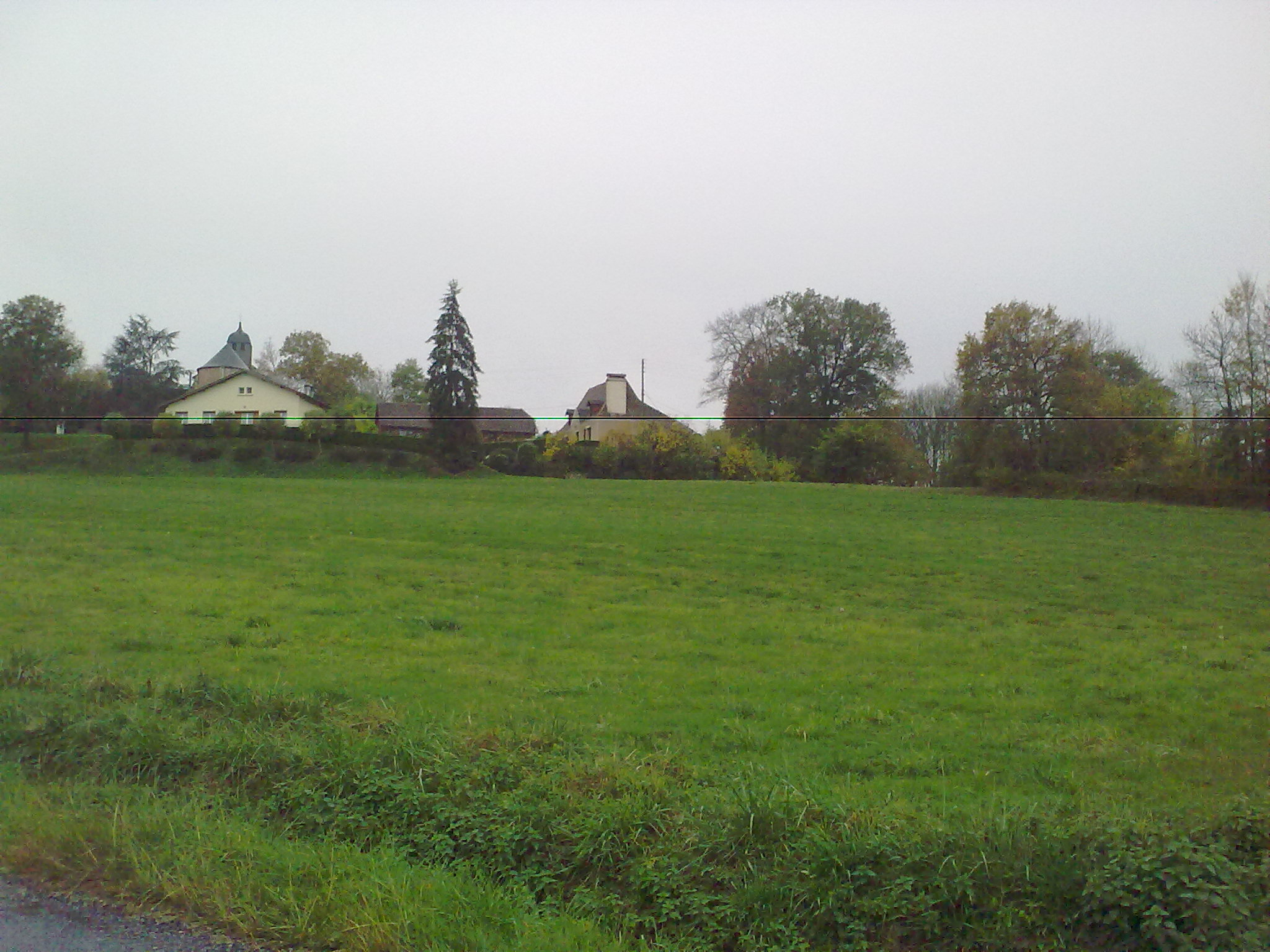 Cadillon